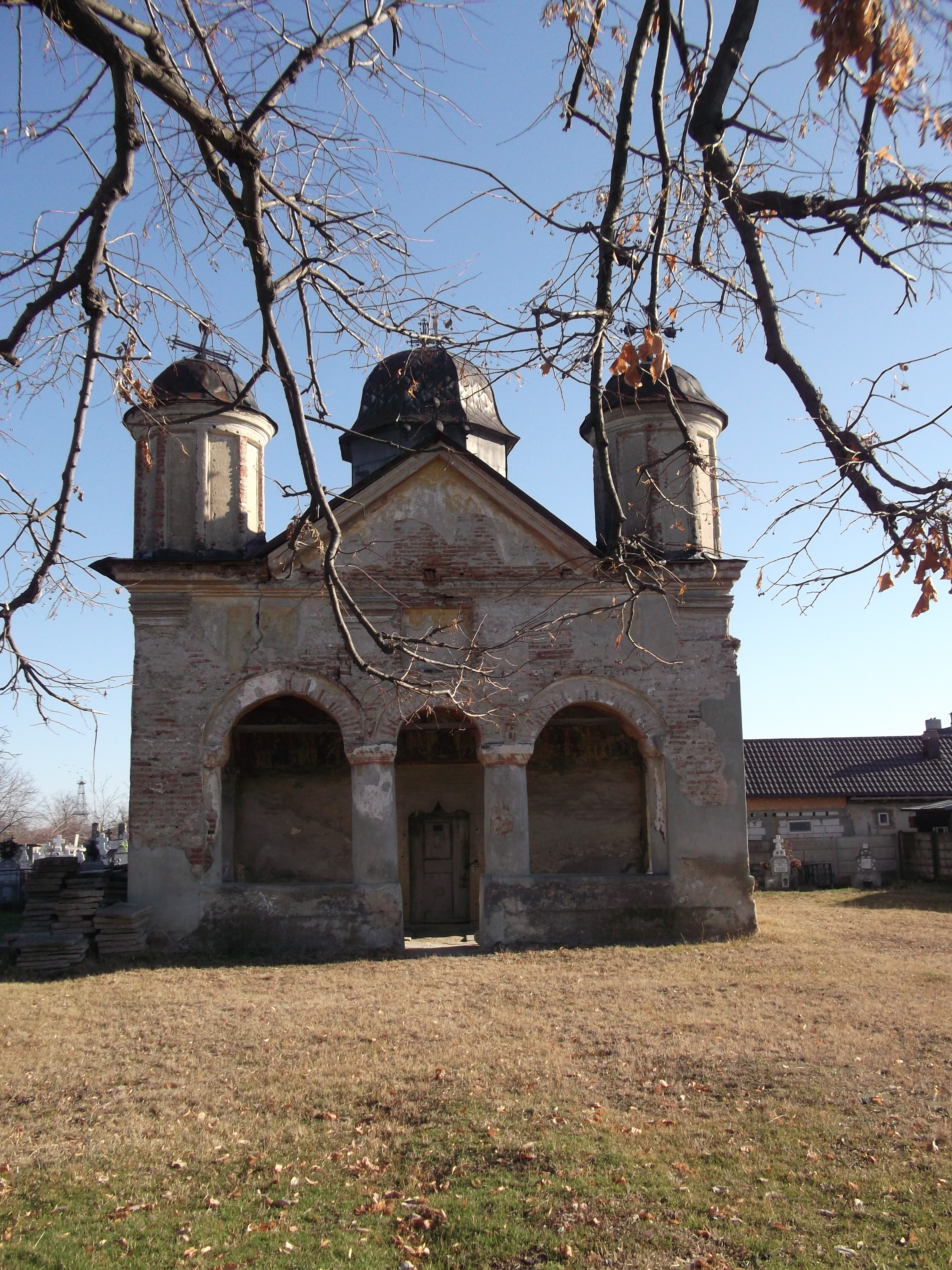 Biserica veche din incinta cimitirului Aricestii-Rahtivani, ctitorita de Enache Vacarescu cu sotia sa Neaga in 1777